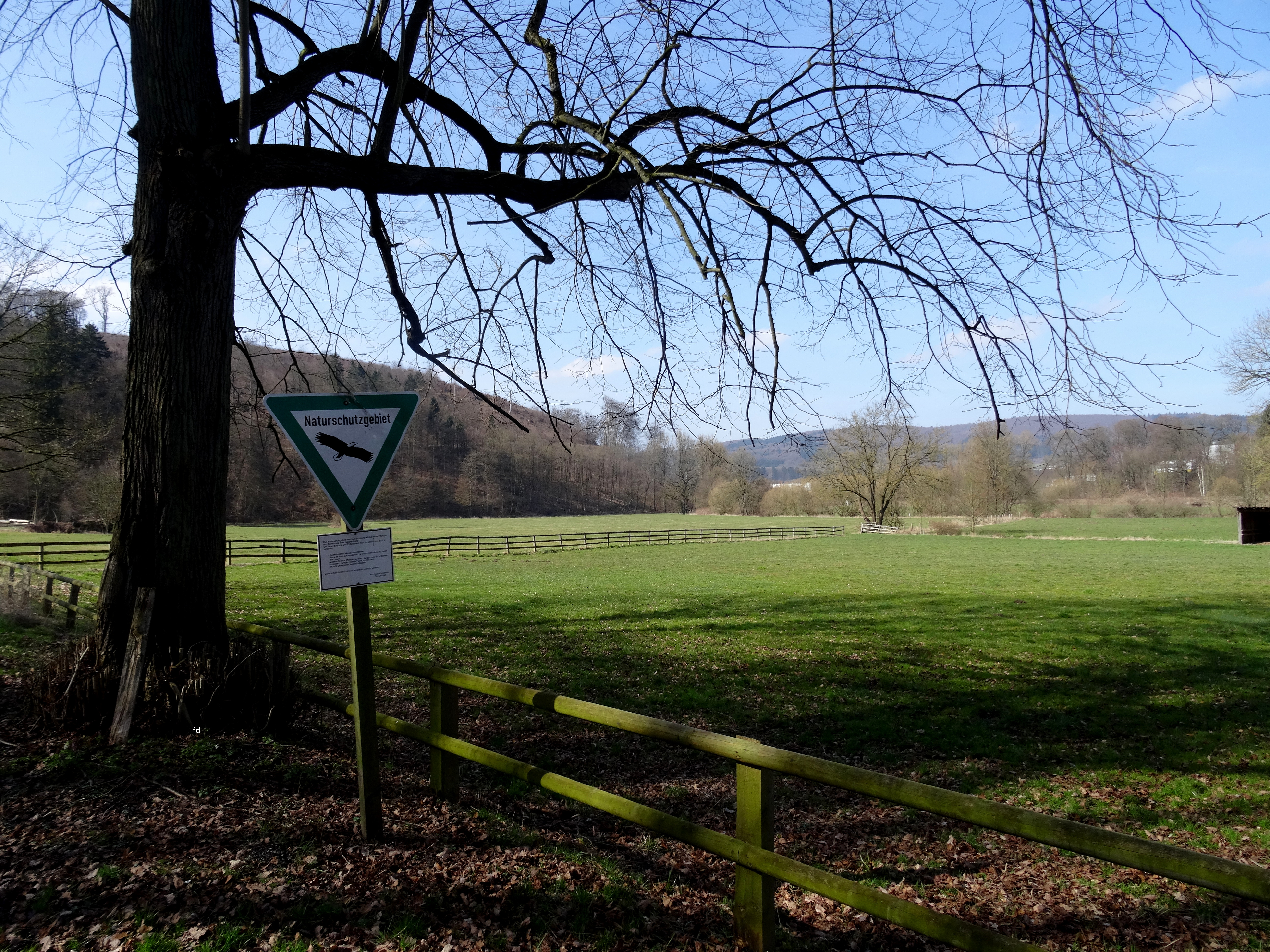 Naturschutzgebiet „Ruhrtal bei Laer“ in Meschede westlich von Schloß Laer